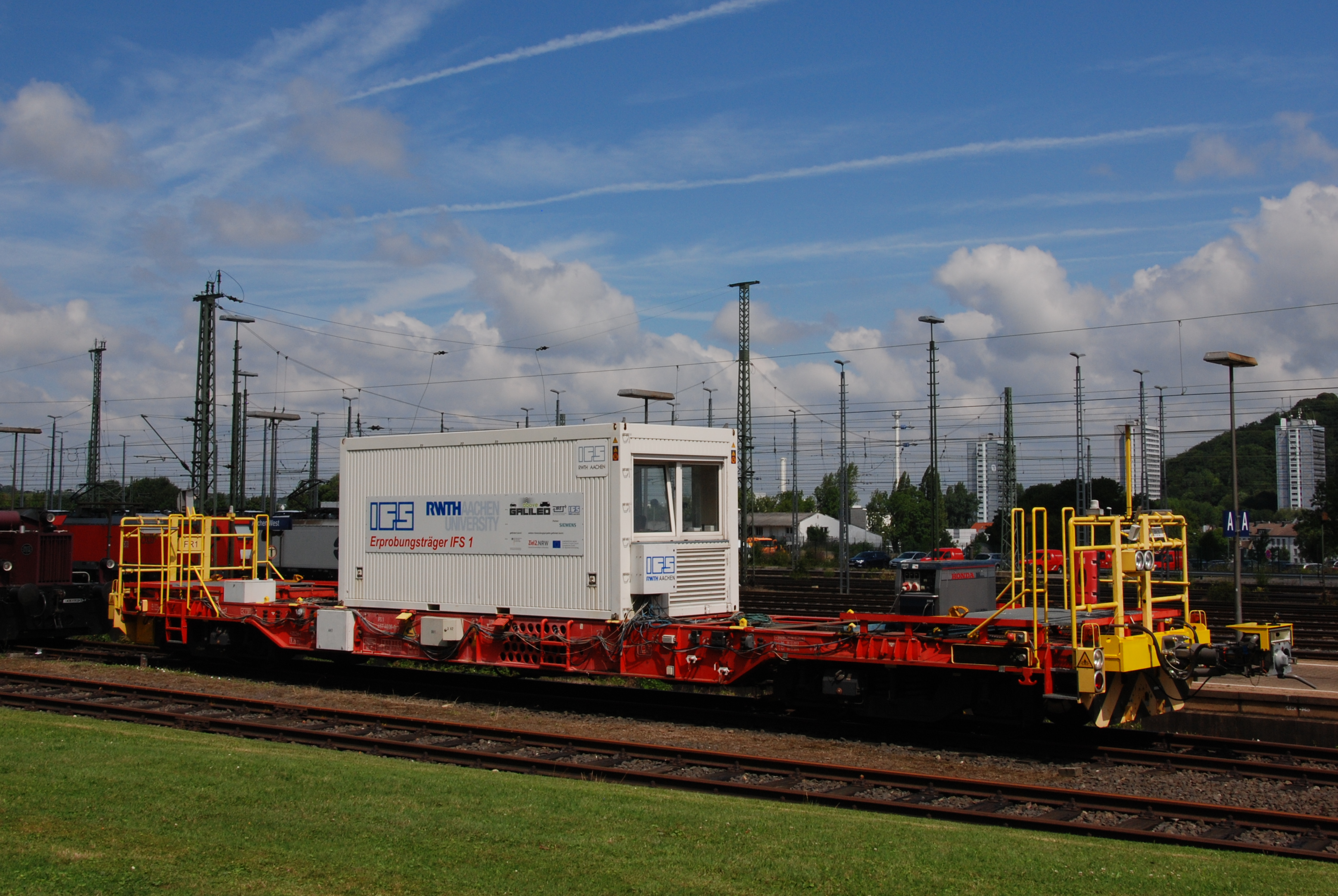 Der Erprobungsträger „IFS 1“ auf dem Gelände des Instituts für Schienenfahrzeuge und Transportsysteme der RWTH Aachen